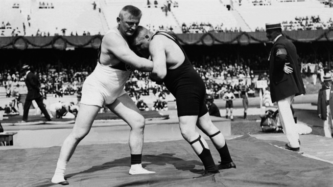 Греко-римская борьба на Олимпиаде 1912 года в Стокгольме: финн Калле Вильямаа против немца Йена Хауптманнса